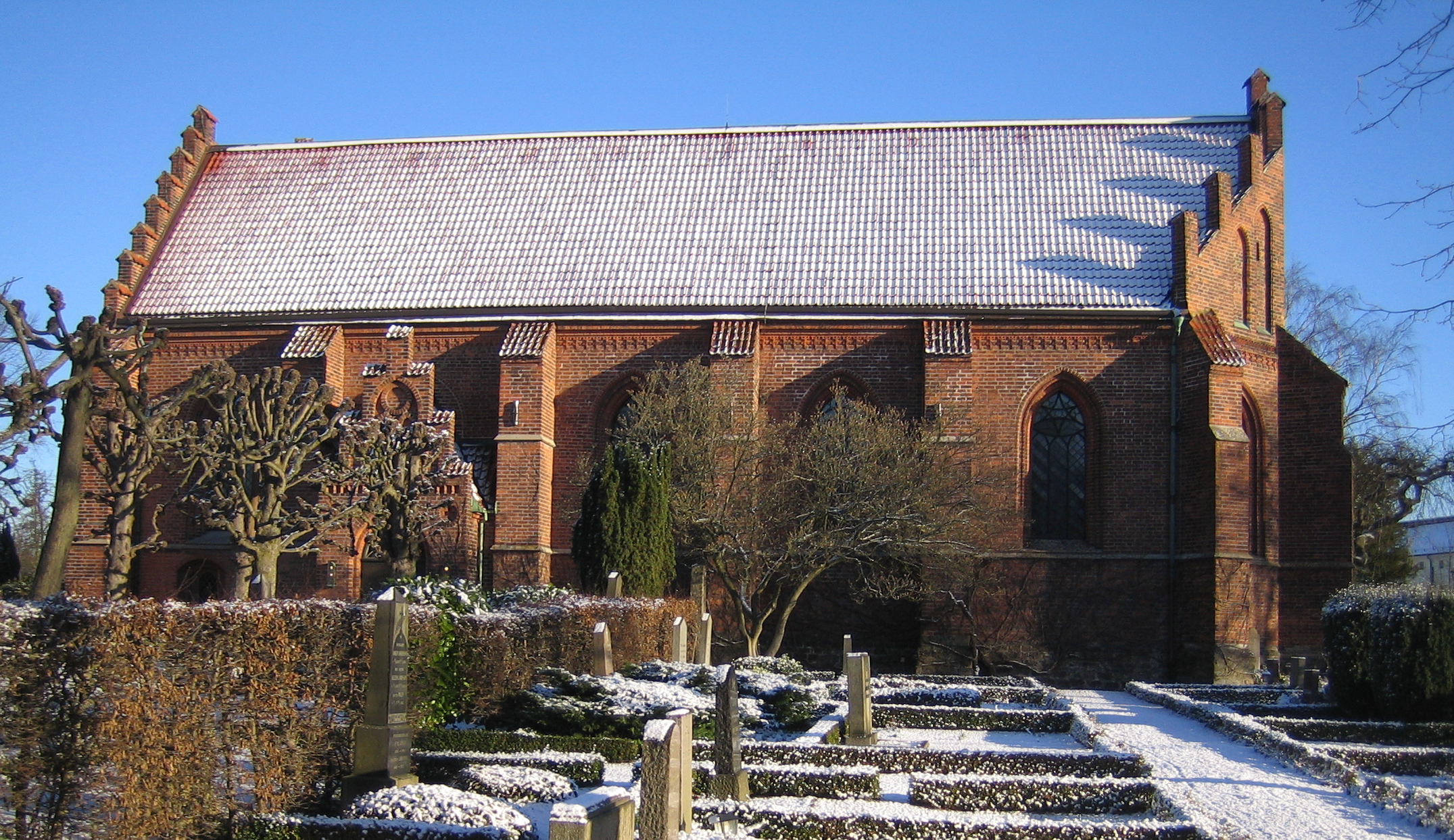 Klosterkyrkan in Lund, Sweden